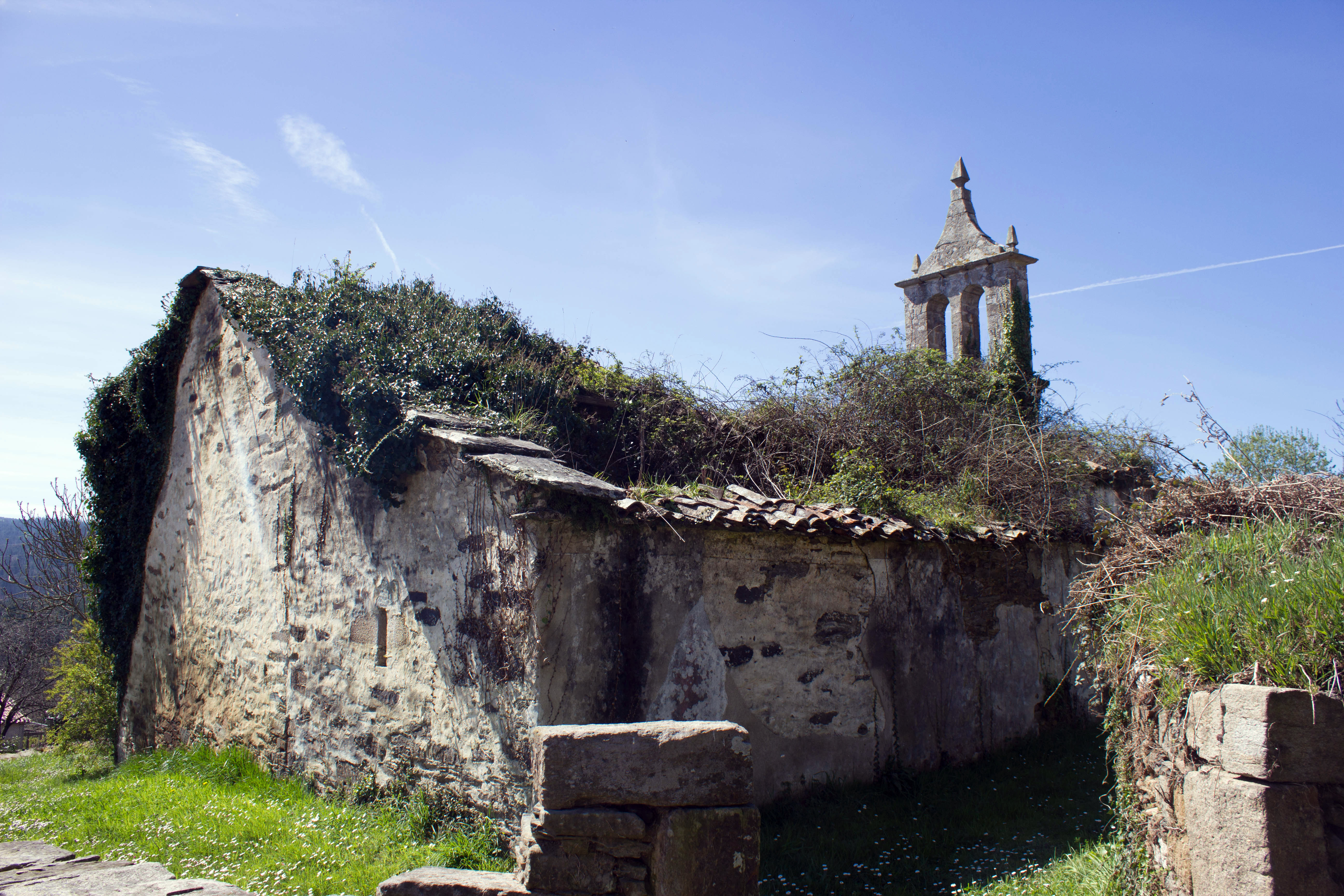 Igrexa vella de San Pedro de Viñós, no concello de Arzúa